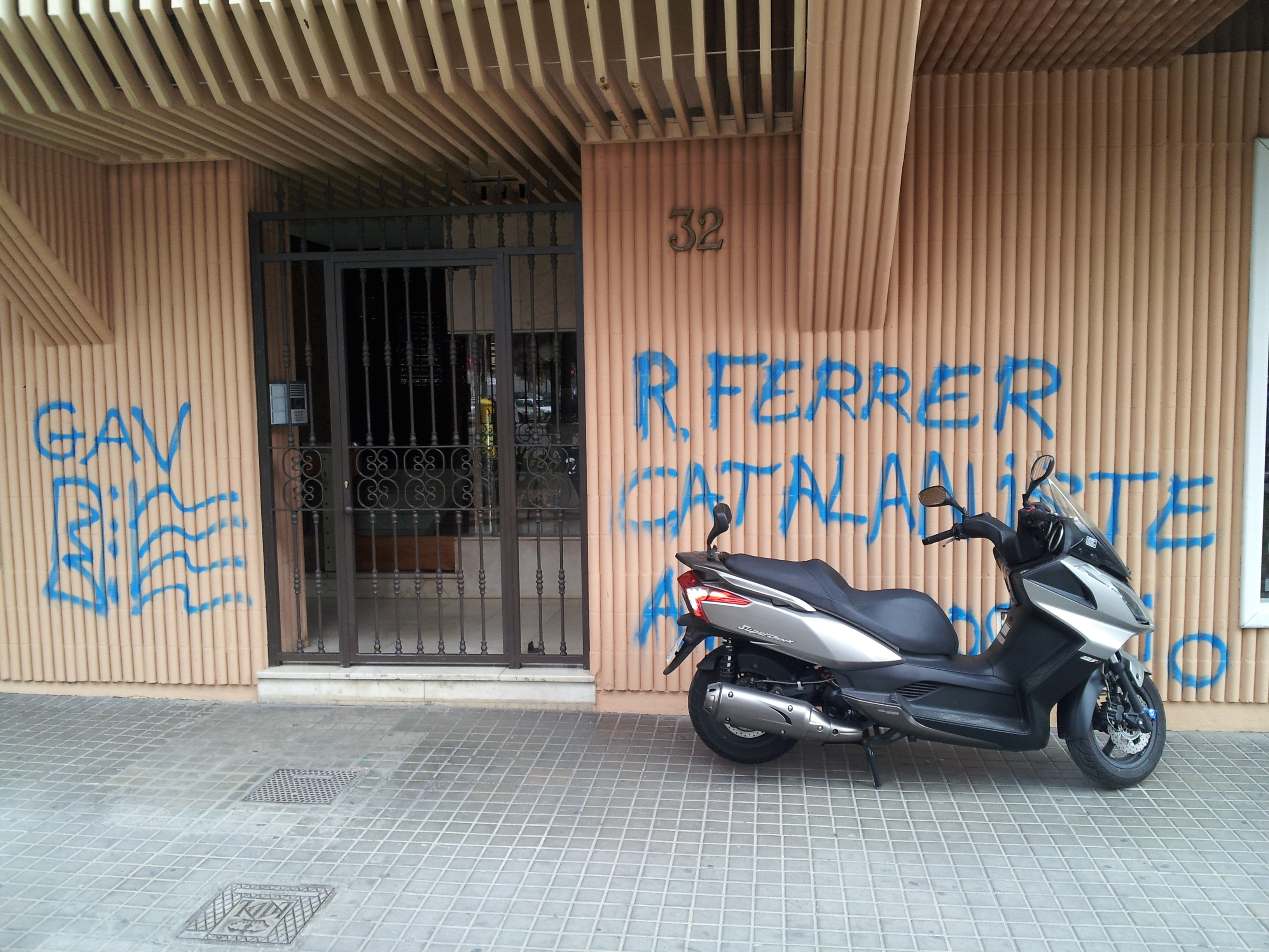 Segon atac del grup de violència de baixa intensitat al domicili del president de l'Acadèmia. Mateixos arguments.